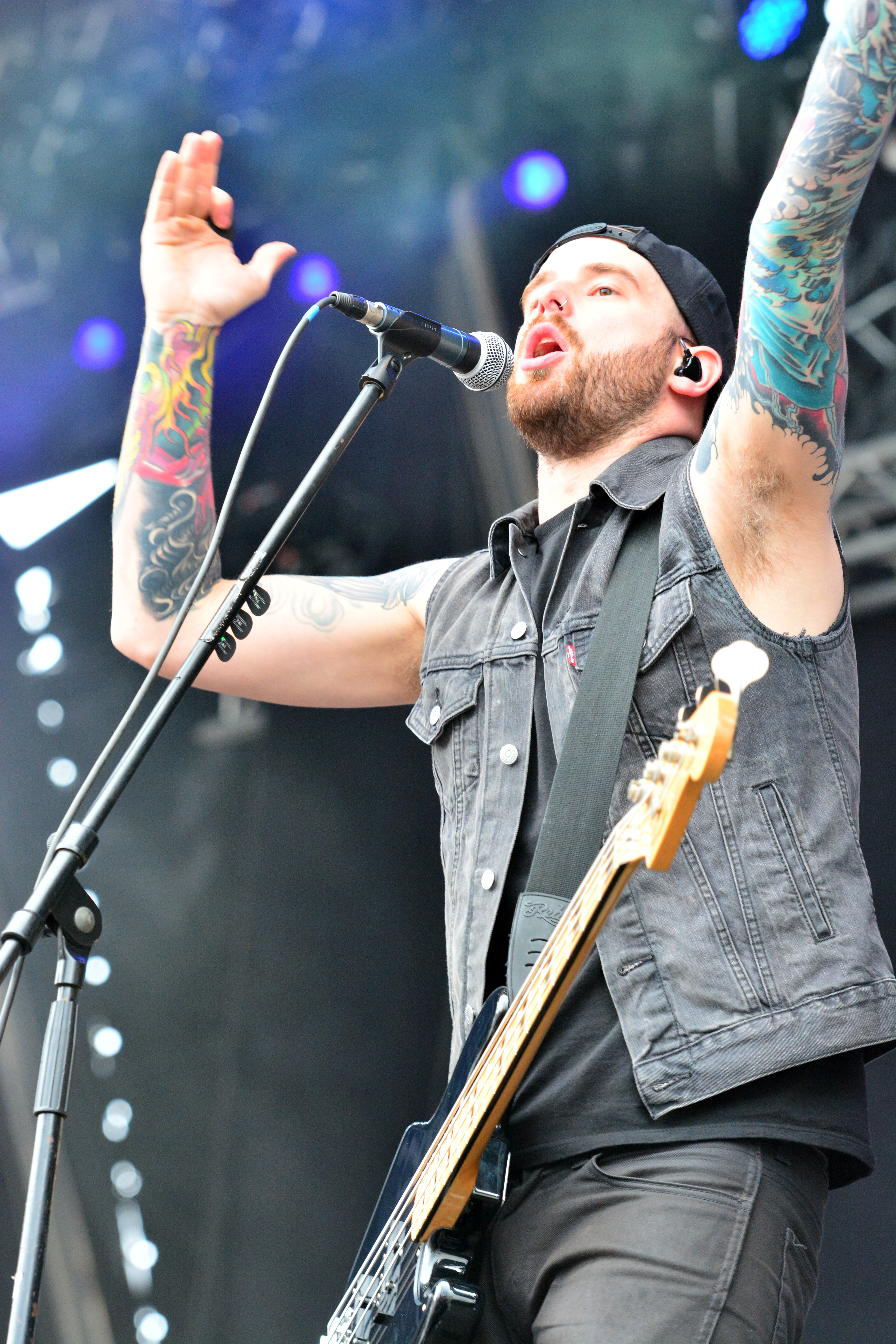 Sänger und Bassist Josh Gilbert von Wovenwar beim Elbriot 2014